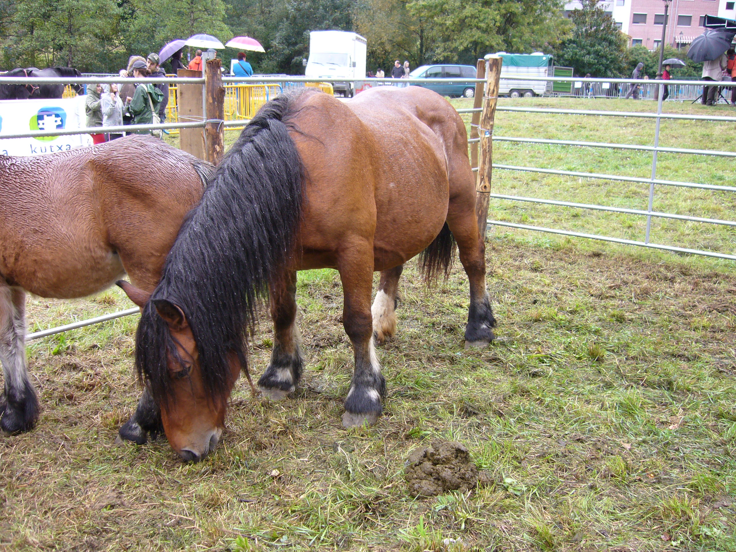 Auritzeko zaldia. Behorra